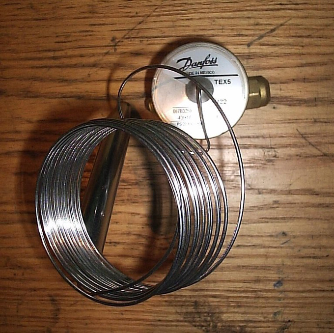 VET TEX5 y Tubo Capilar